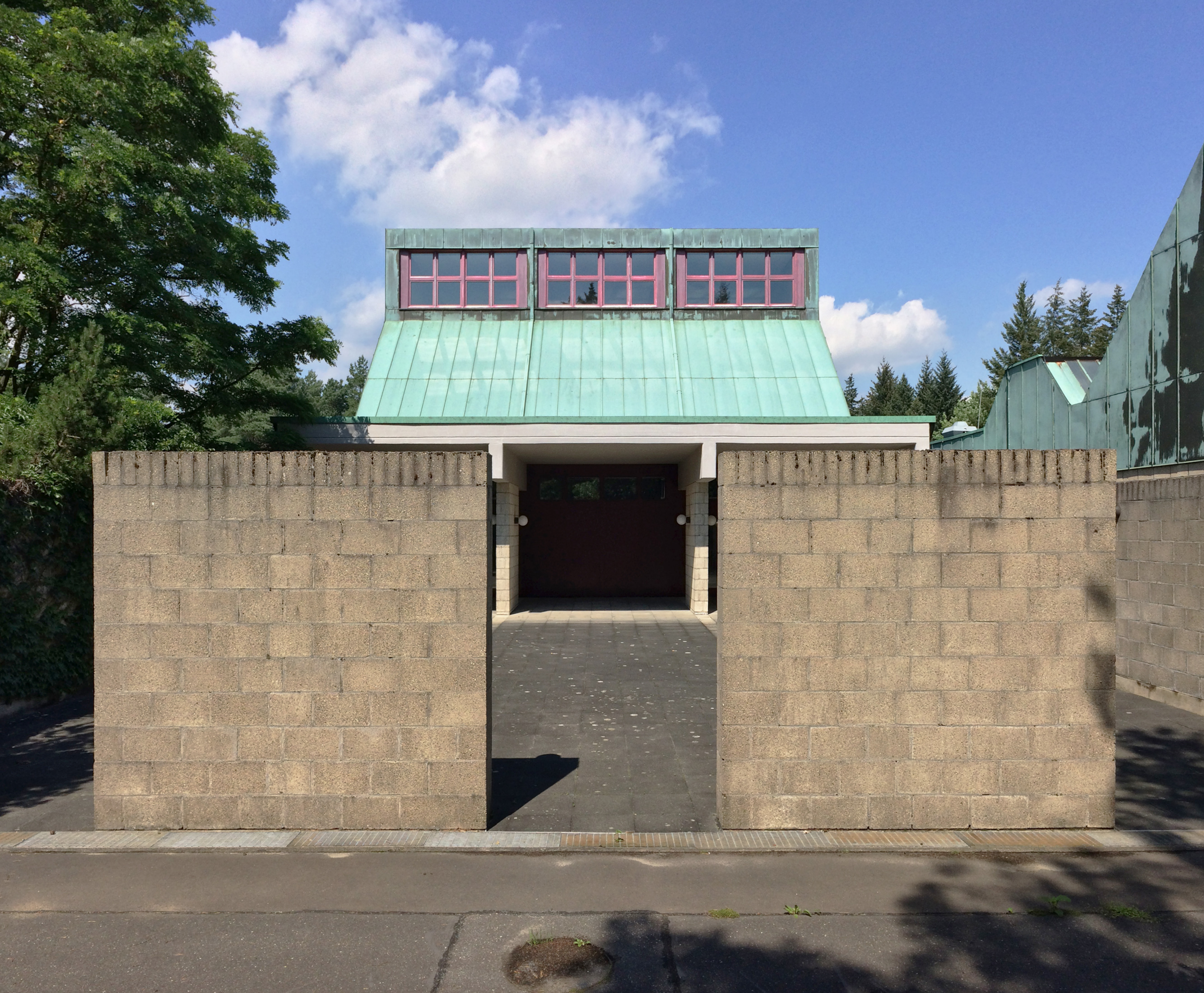 Friedhof Ruhleben, Am Hain, Berlin-Westend, 1972–1975, Rave und Rave Architekten (Jan Rave, Rolf Rave, Hans-Joachim Knöfel, Dieter Meisel, Johann-Heinrich Olbrisch, Kristin Ammann)